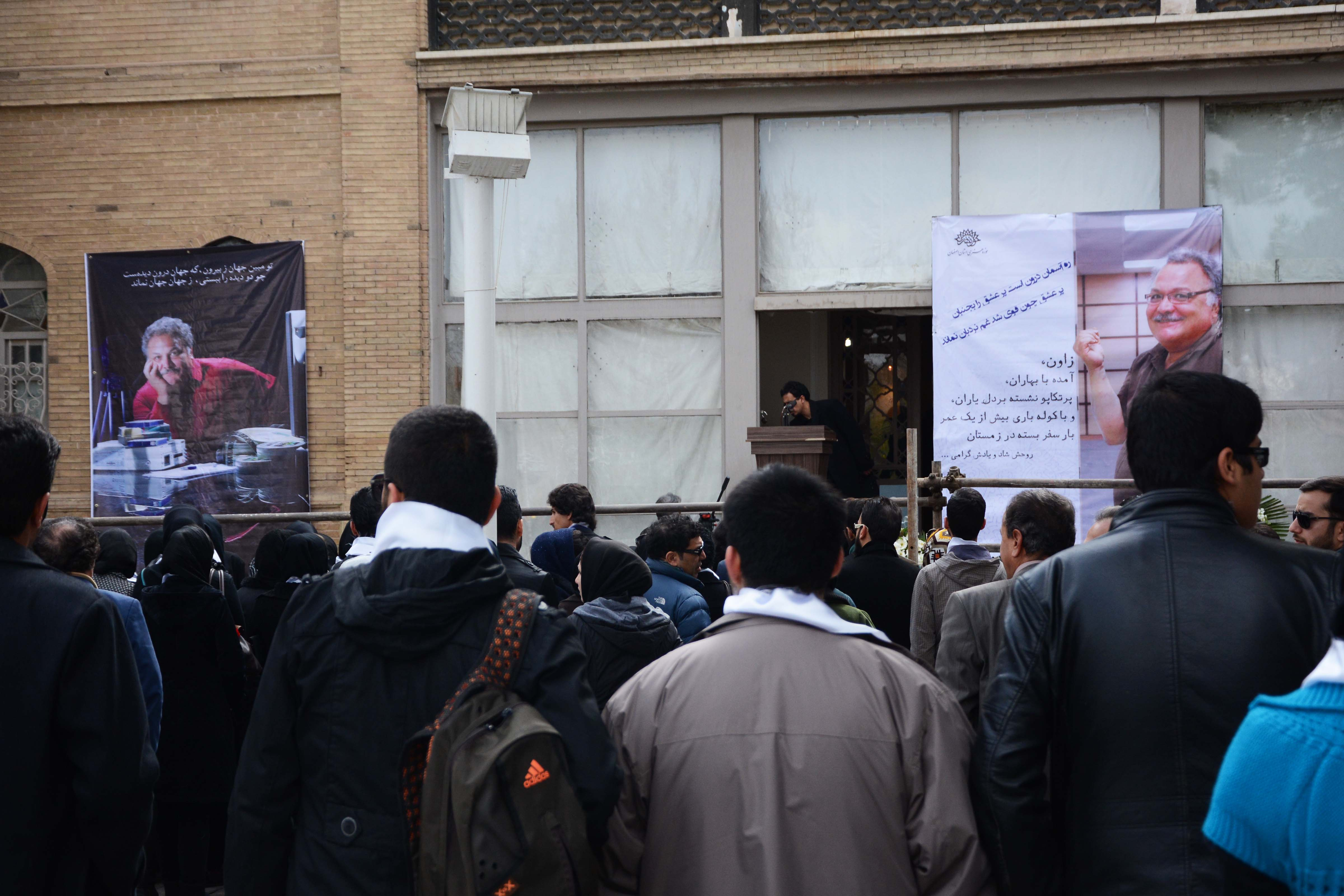 مراسم خاکسپاری زاون قوکاسیان